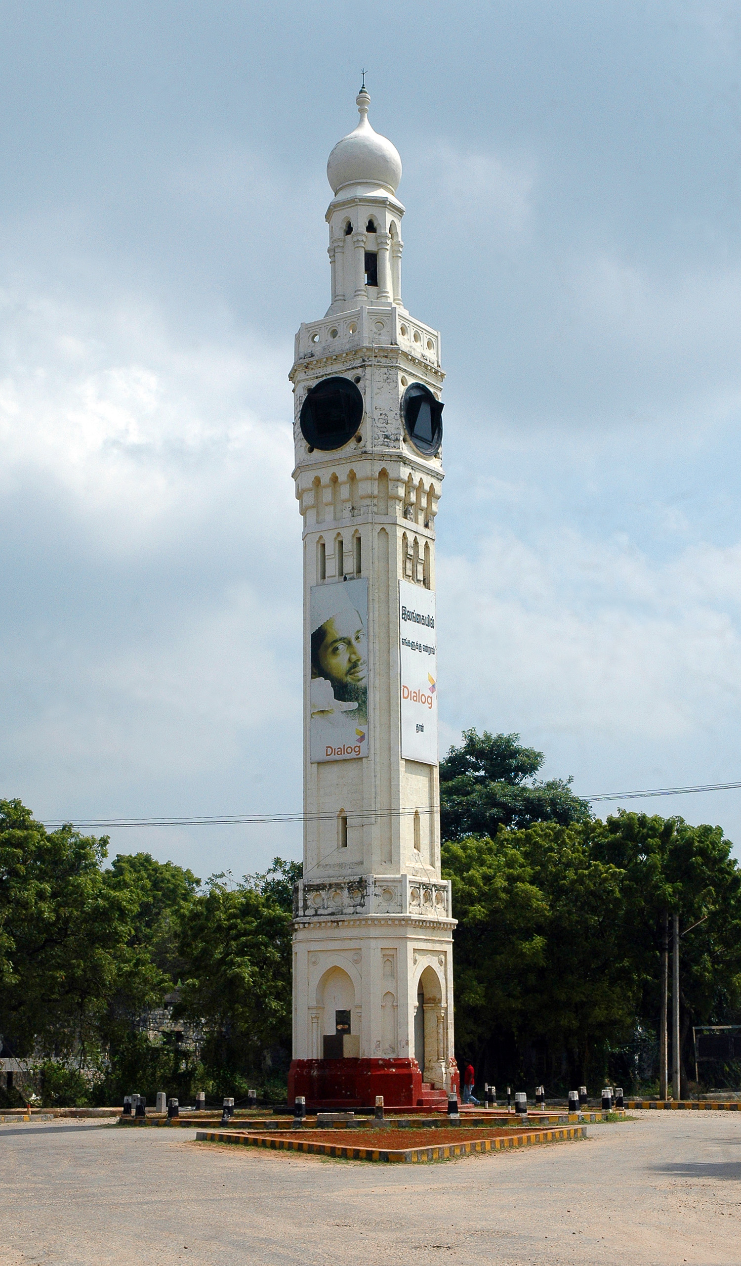 யாழ்ப்பாணம் மணிக்கூட்டுக் கோபுரம்